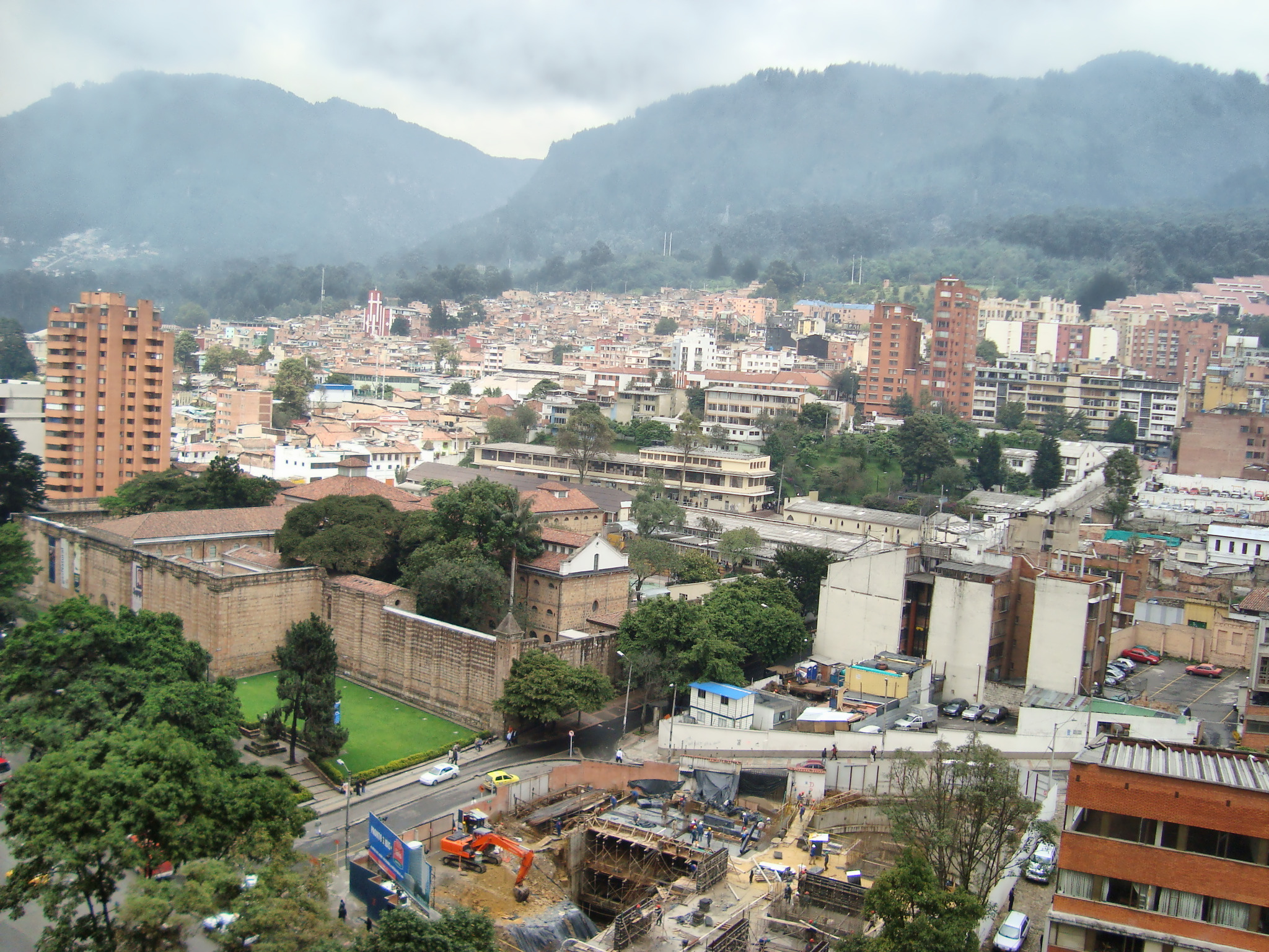 Museo Nacional